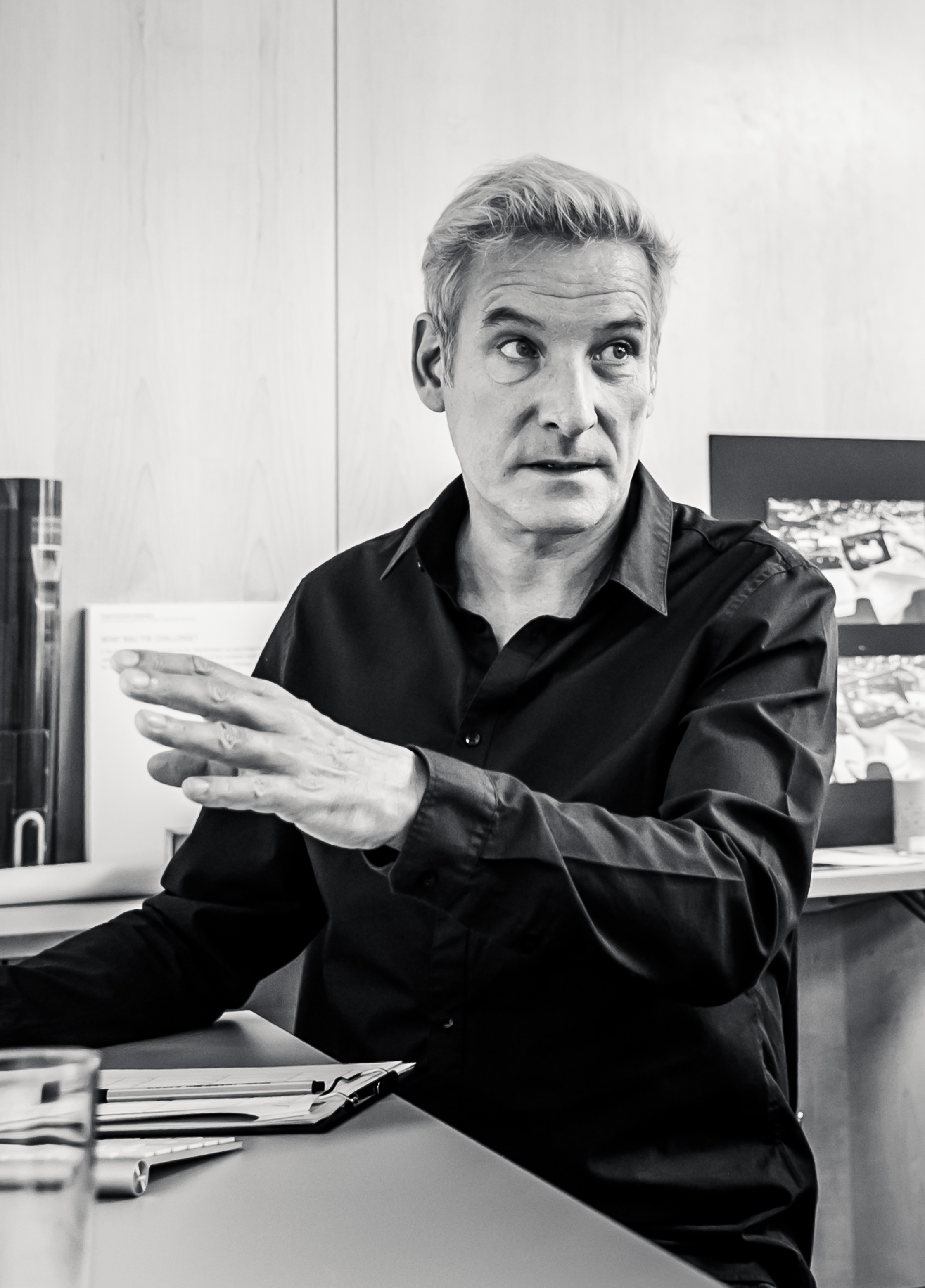 Der Mediendesigner Eku Wand während der Jurysitzung des German Design Award am 27.7.2017 in Frankfurt am Main